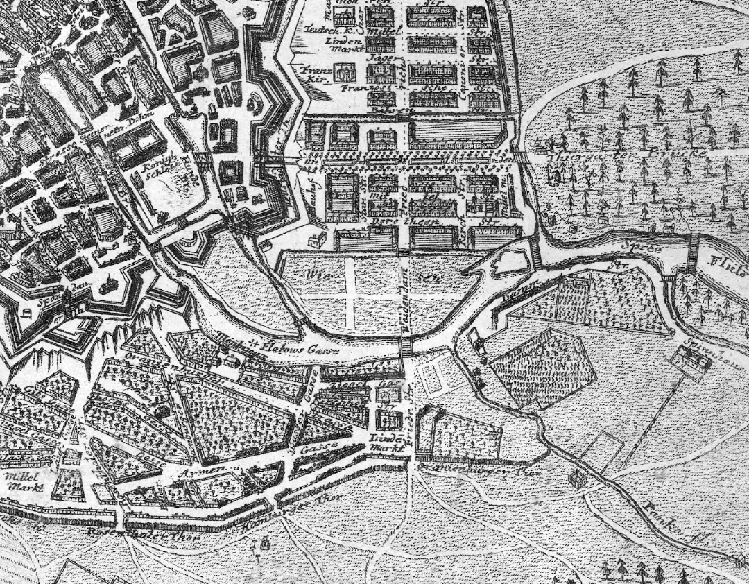 Die Königl. Residenz Berlin, wie selbige sich um das Jahr 1723 präsentiret : nach dem von G. Dusableau gezeichneten Plan verfertigt